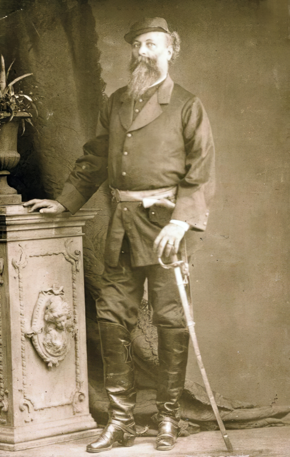 Antonio Guzman Blanco